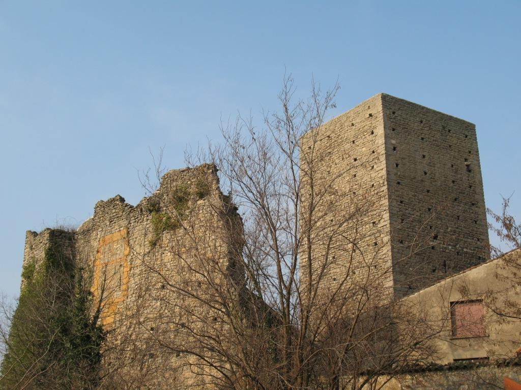 Ruines du château de St Germain au Mont d'Or